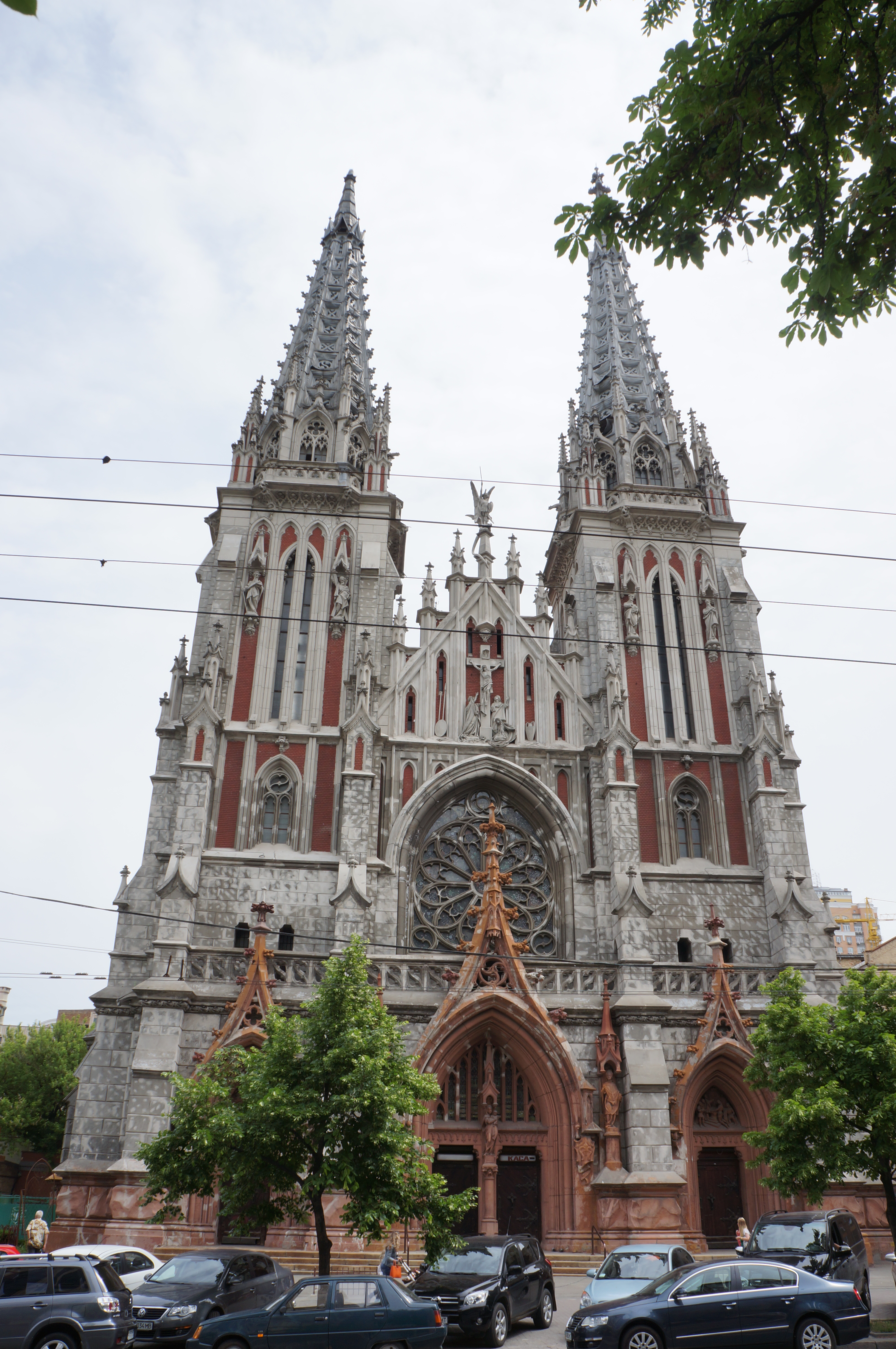 Костьол св. Миколая, Київ, Червоноармійська вул., 77